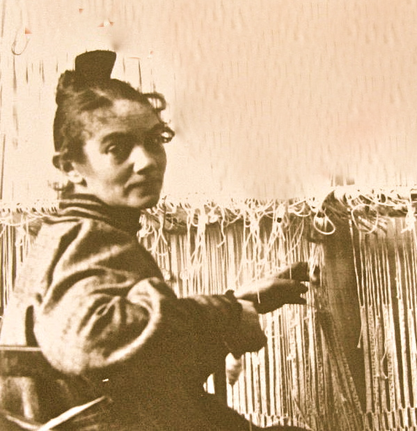 Karin Larsson Bergöö achter haar weefgetouw